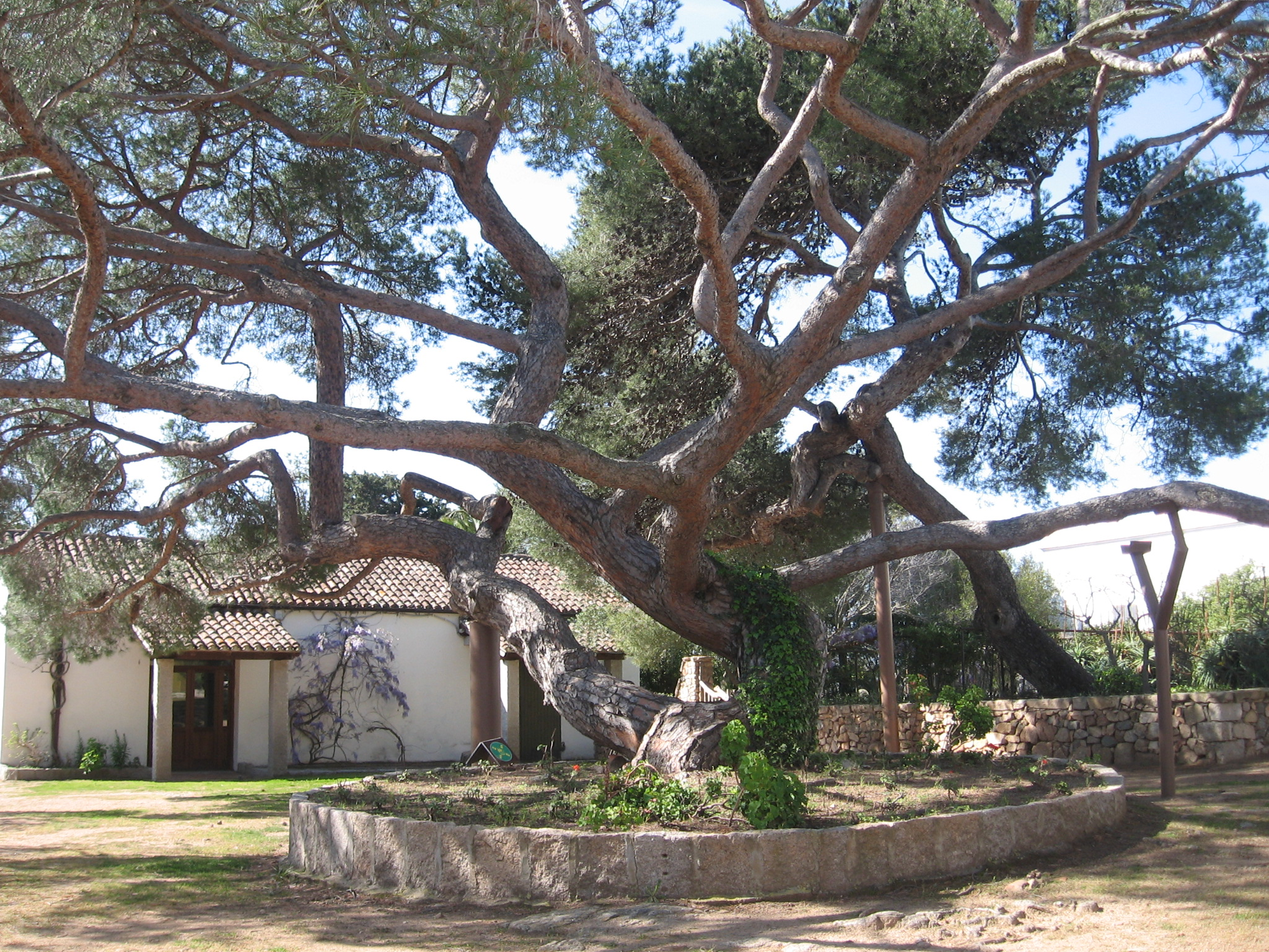 Museo garibaldino di Caprera.